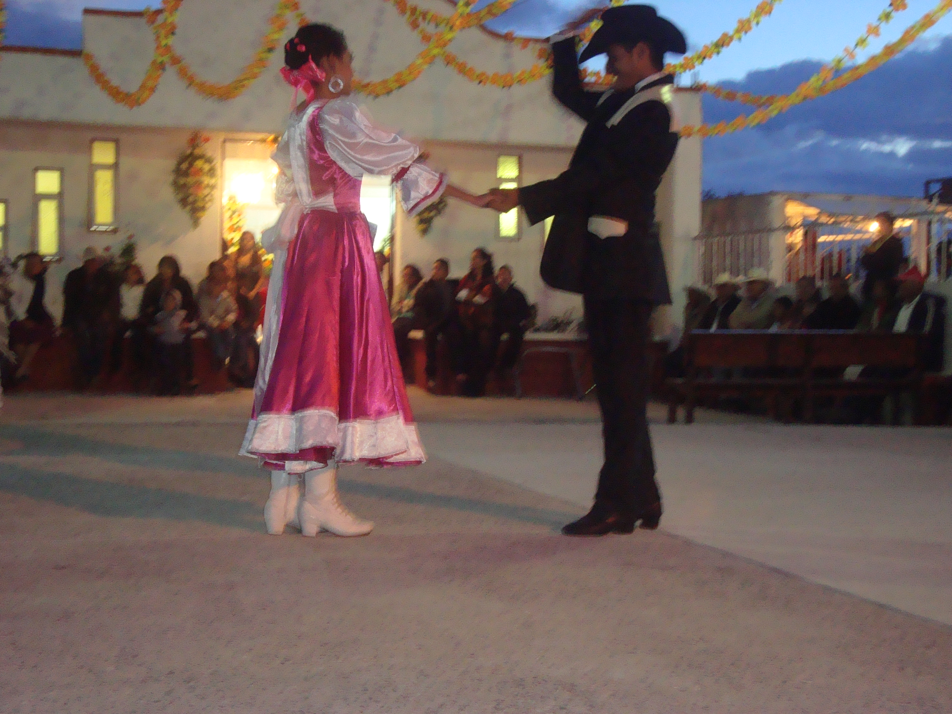 Polka de Chihuahua bailada por Arturo y Cristina en Estación Techa el día 16 de julio de 2011: "Jesusita En Chihuahua"